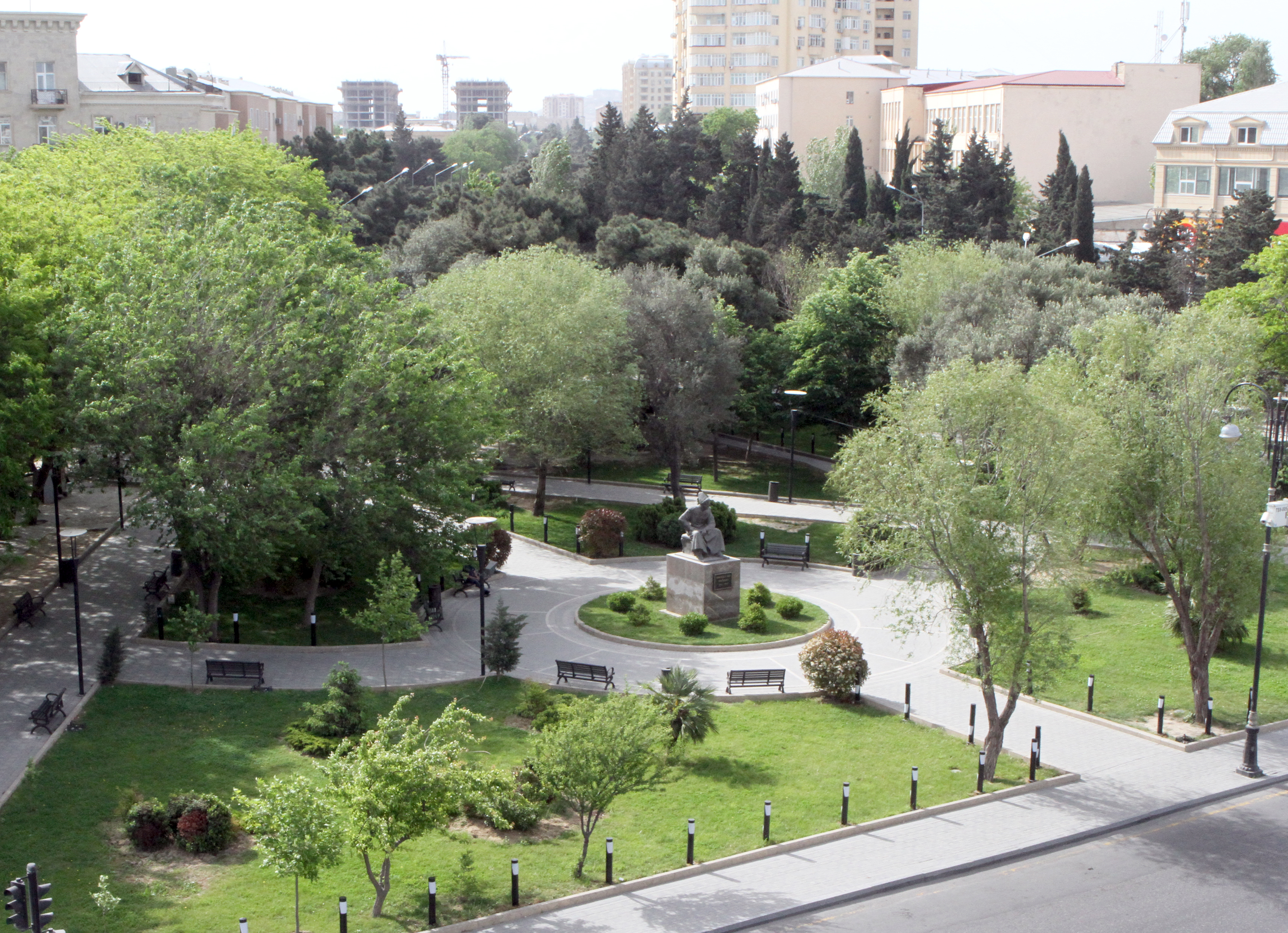 Bakıxanov parkı